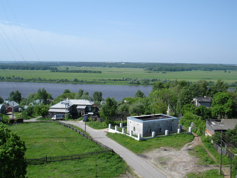 Вид на мавзолей Шах-Али хана и реку Оку с минарета Ханской мечети в г. Касимов, Рязанская область, Россия